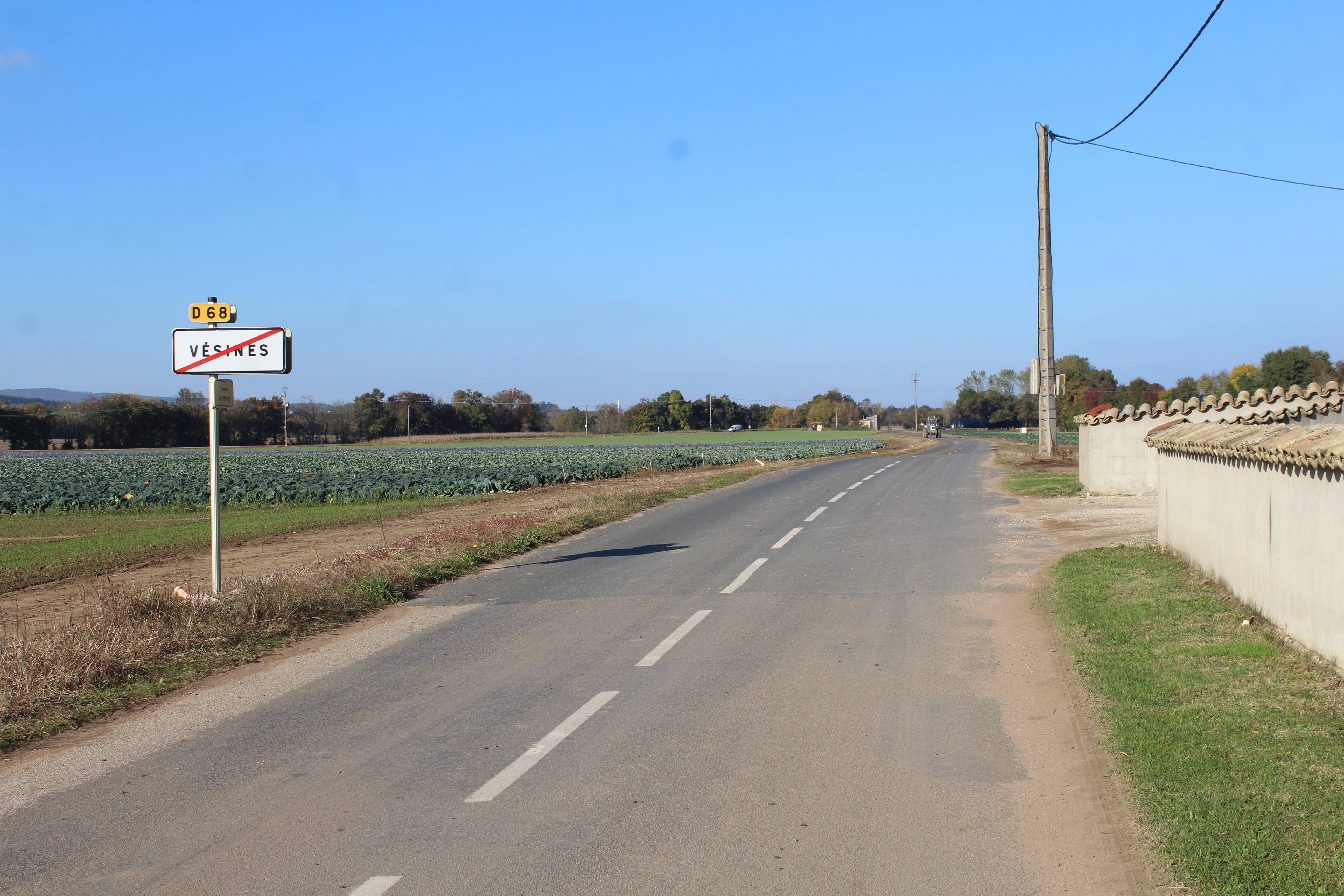 Sortie de Vésines en direction de Manziat et d'Asnières-sur-Saône depuis le route D68.